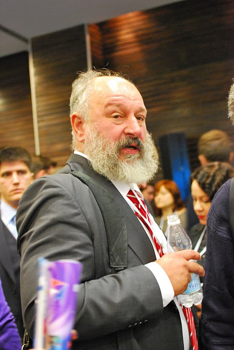 Андрей Николаевич Терехов, профессор СПбГУ, генеральный директор Lanit-Tercom, на Санкт-Петербургском Инновационном Форуме